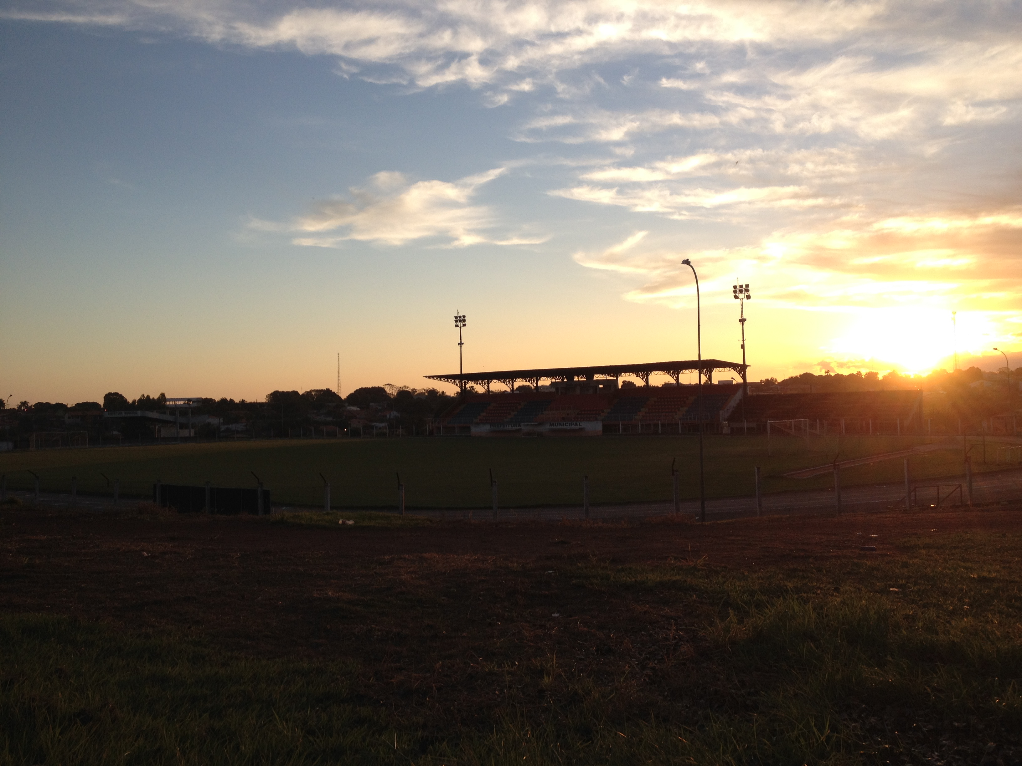 Estádio Municipal Luizinho Turatti de Espigão do Oeste, em Rondônia